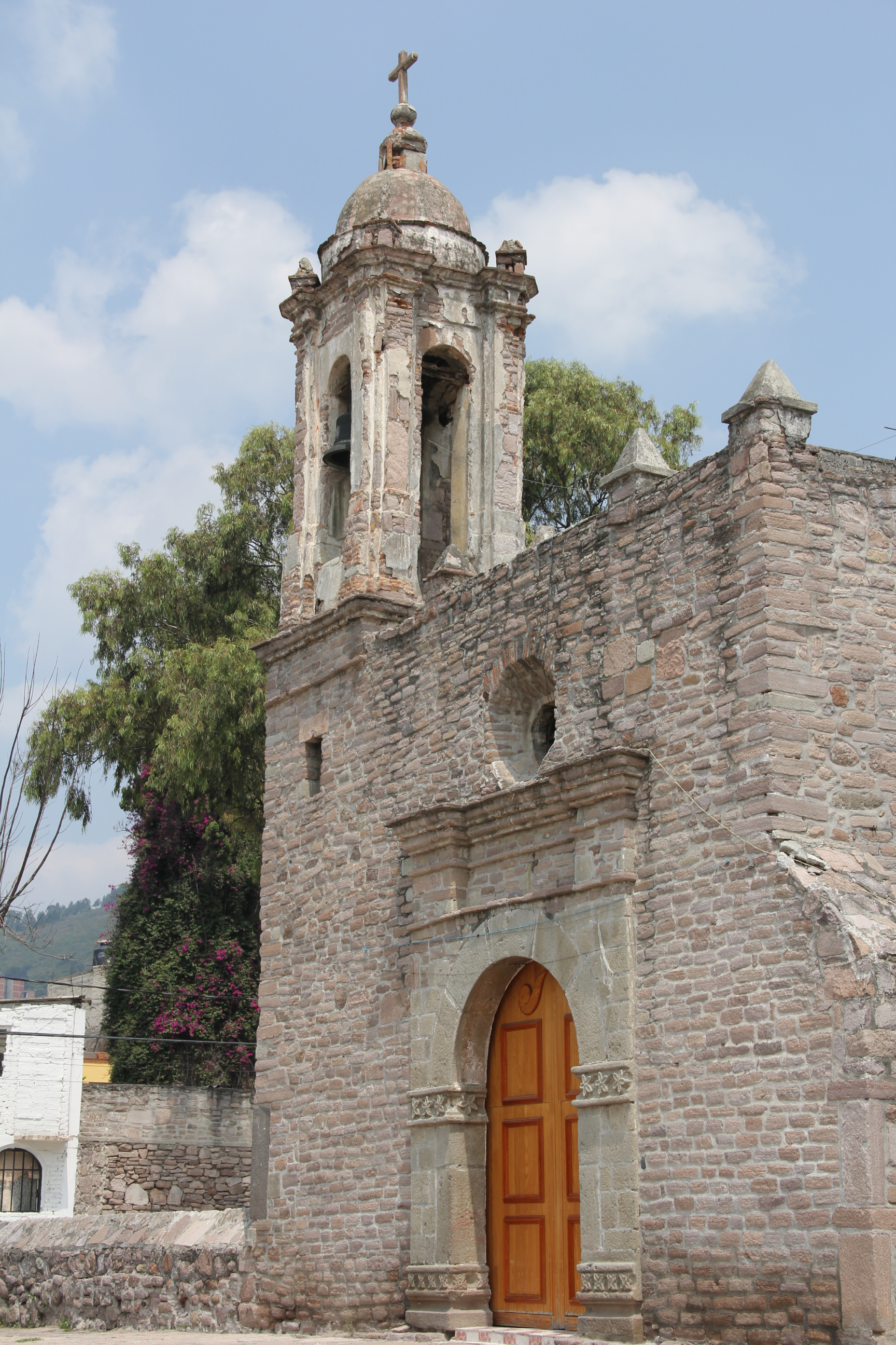 Capilla colonial del pueblo de Santa Cecilia Acatitlán, construido con piedras de las pirámides adyacentes.